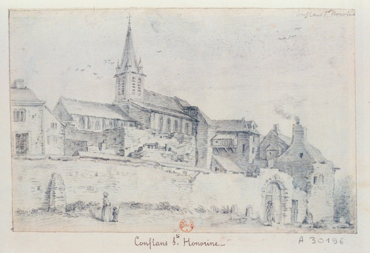 Conflans-Sainte-Honorine, vue de l'église